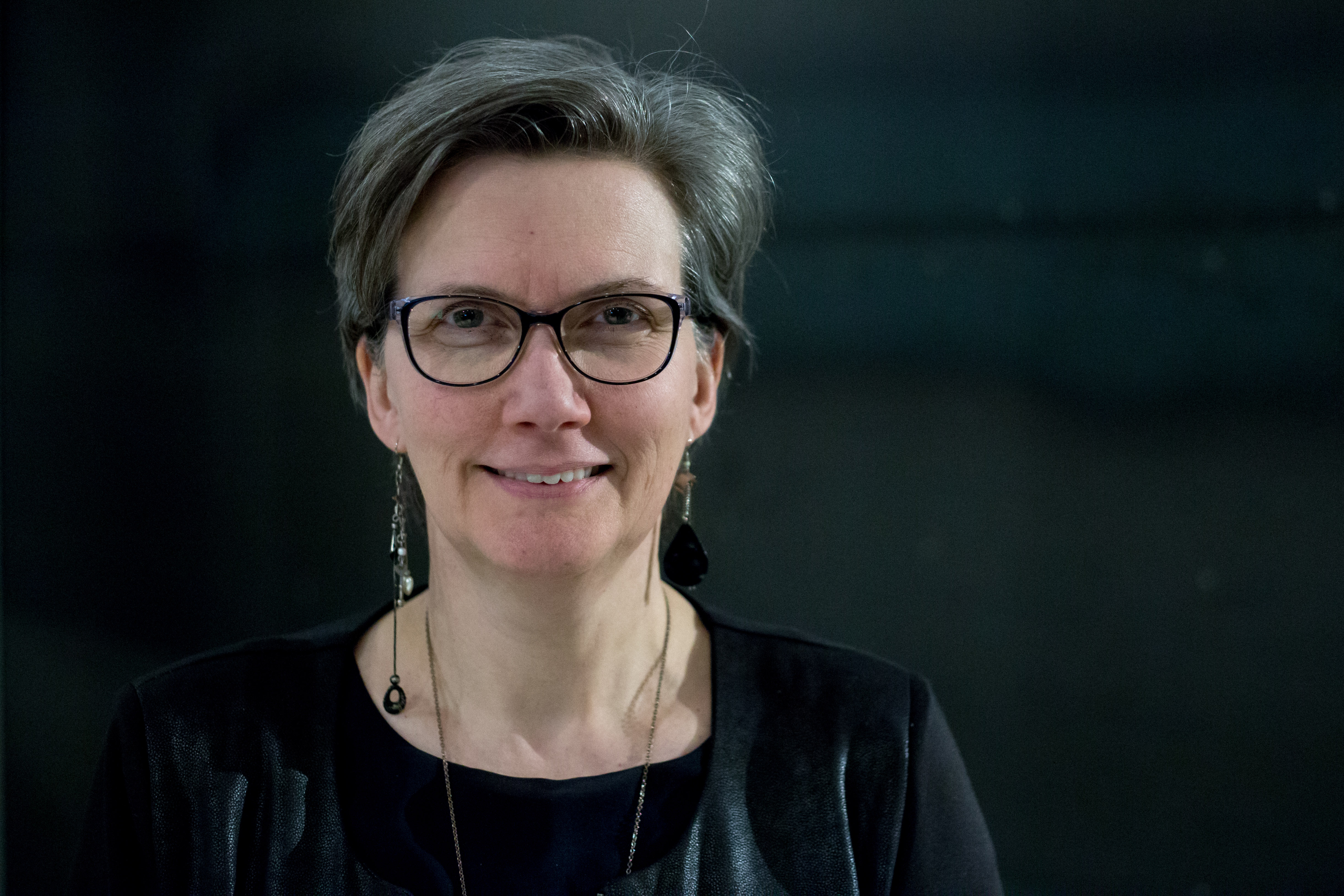 Portrait de la productrice Anne-Marie Gélinas. À la Cinémathèque québécoise dans le cadre d'un atelier portant sur ses réalisations.